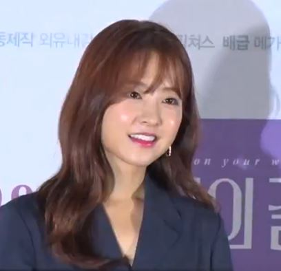 디스패치 구독 클릭! Dispatch Subscribe